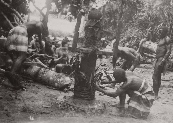 Foto. Aan een boomstam worden met behulp van klei verschillende kruiden vastgemaakt, als altaar waar geofferd kan worden bij bepaalde rituelen.. Marrons bezig met het vervaardigen van een ritueel beeld